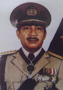 Jenderal Polisi Awaluddin Djamin sebagai Kapolri